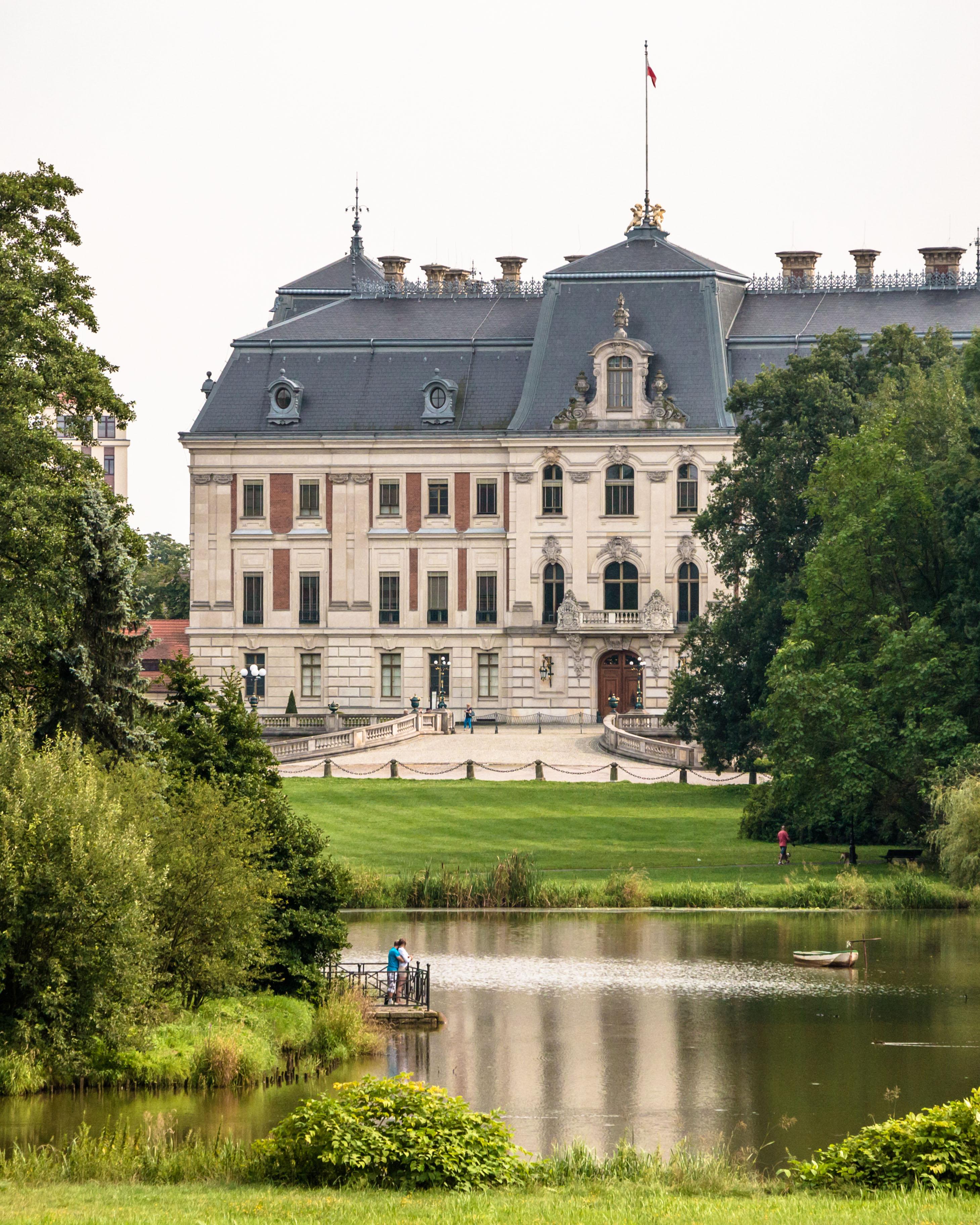 Pszczyna, pałac, ob. Muzeum Zamkowe, XVII w., XX w.